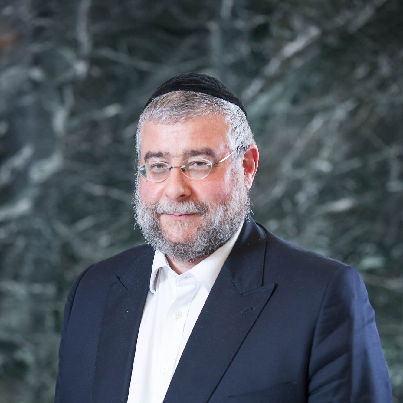 נשיאה הנוכחי של ועידת רבני אירופה